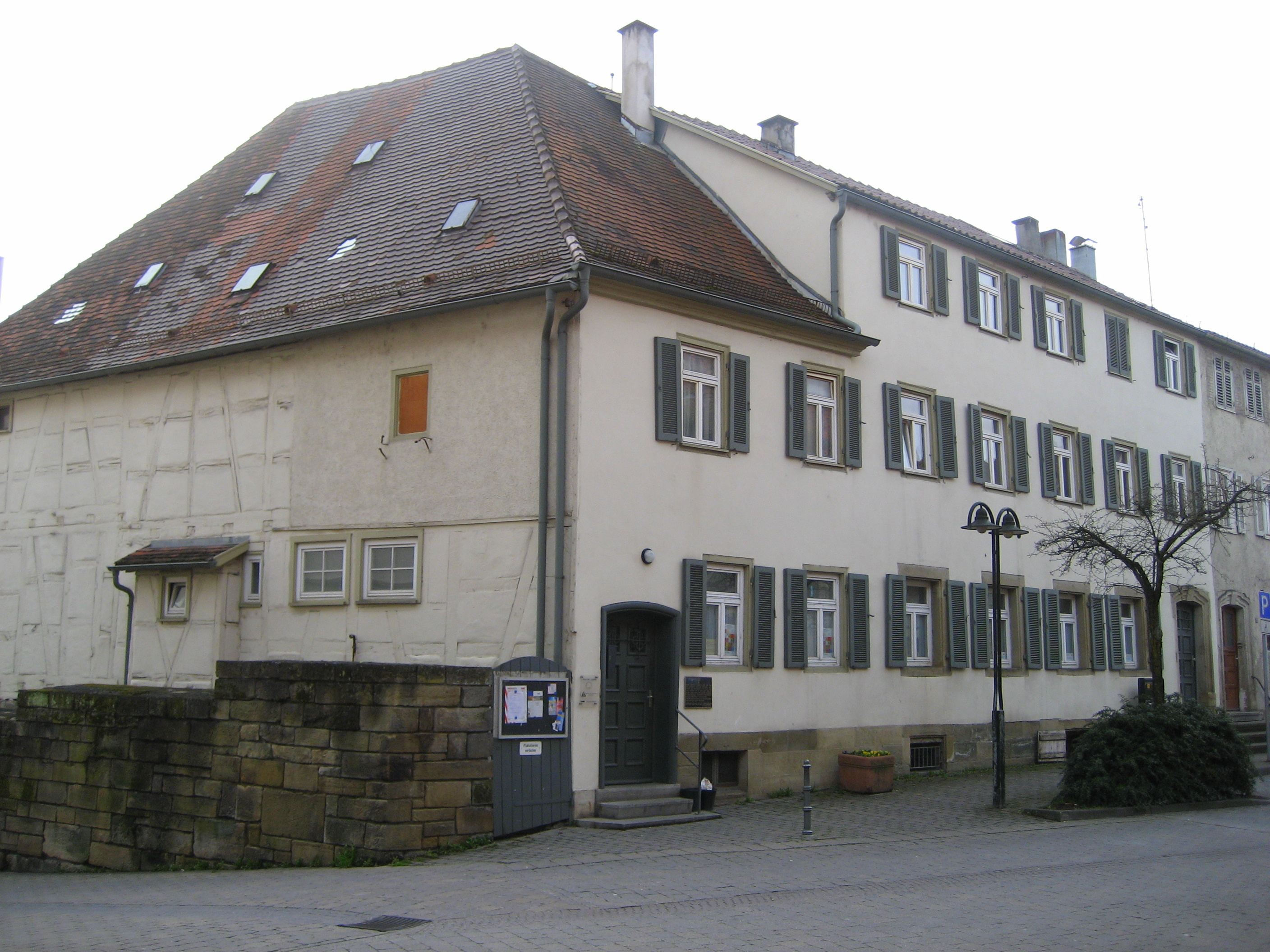 Öhringen alte Synagoge